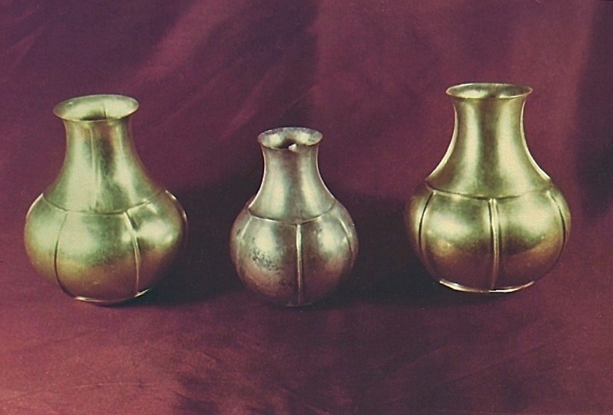 Los dos frascos de oro y uno de los de plata del Tesoro de Villena (piezas 41, 43 y 42).